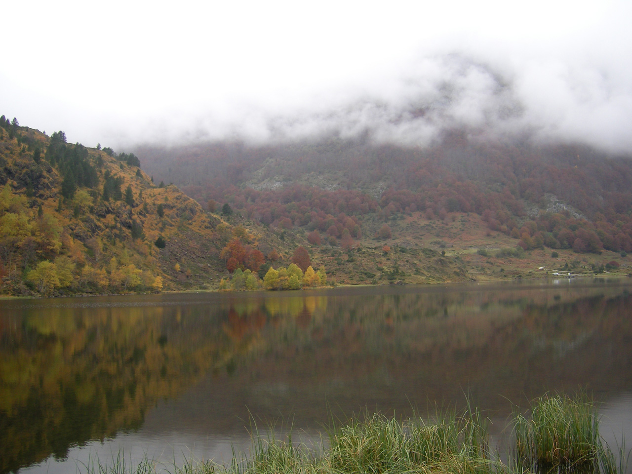 Le Port (Ariège, France) : l'étang de Lers.